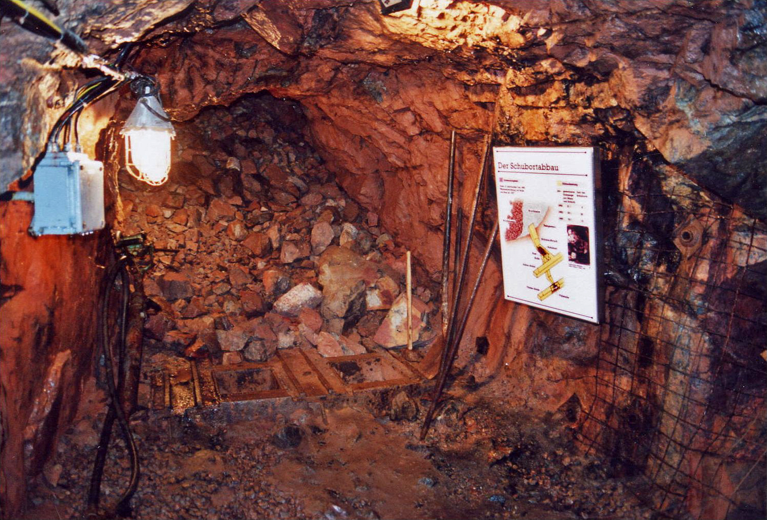 Altenberg (Erzgebirge): Darstellung des Schubortabbaus im "Neubeschert-Glück-Stollen" des Bergbaumuseums